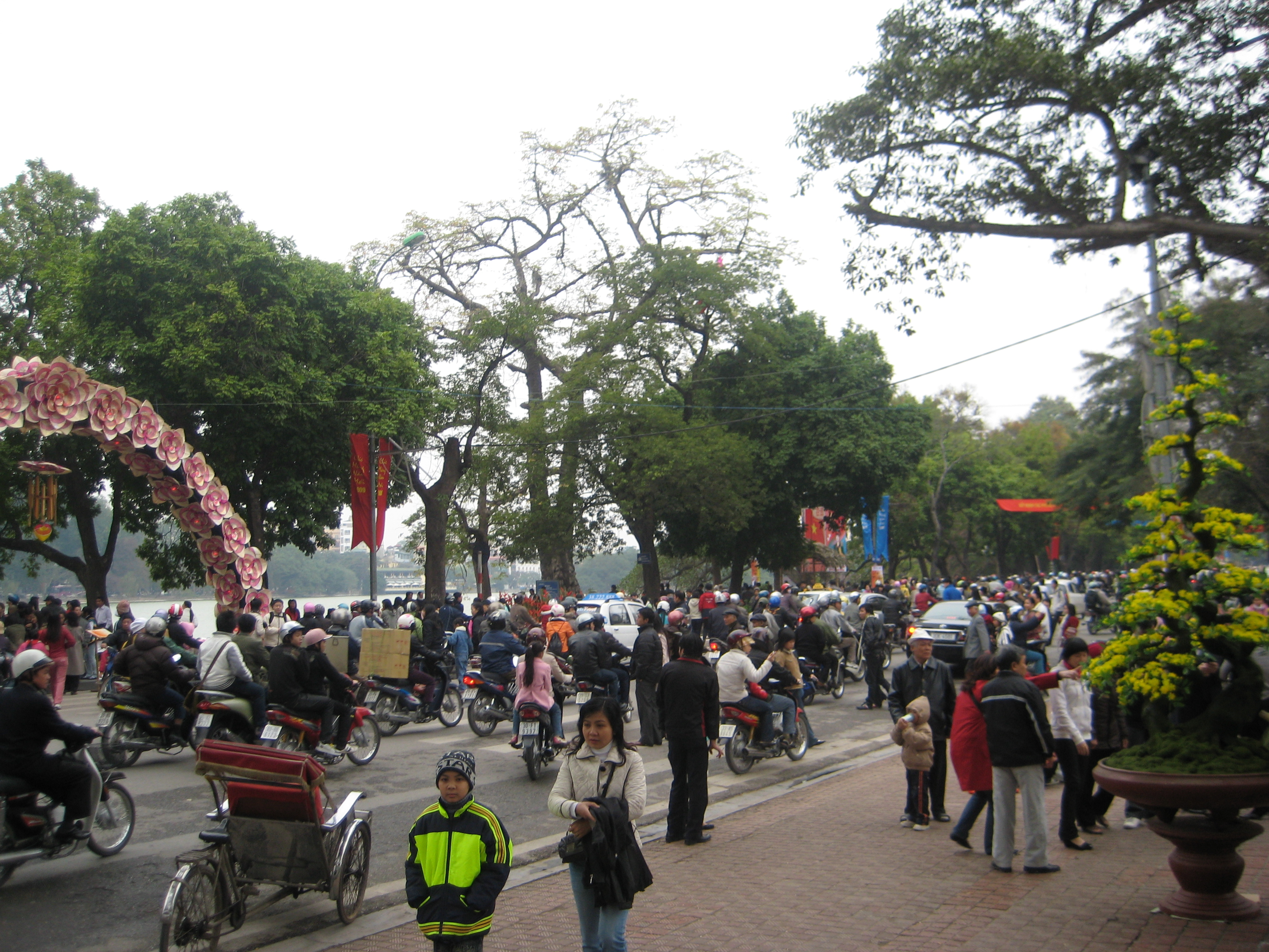 Phố hoa Đinh Tiên Hoàng bên hồ Hoàn Kiếm thủ đô Hà Nội